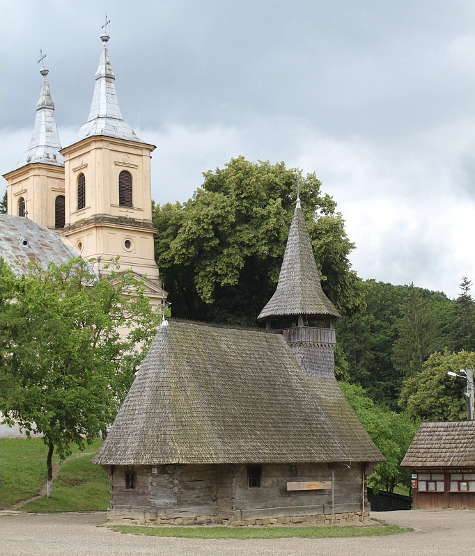 Biserica de lemn din Gostila, județul Sălaj.